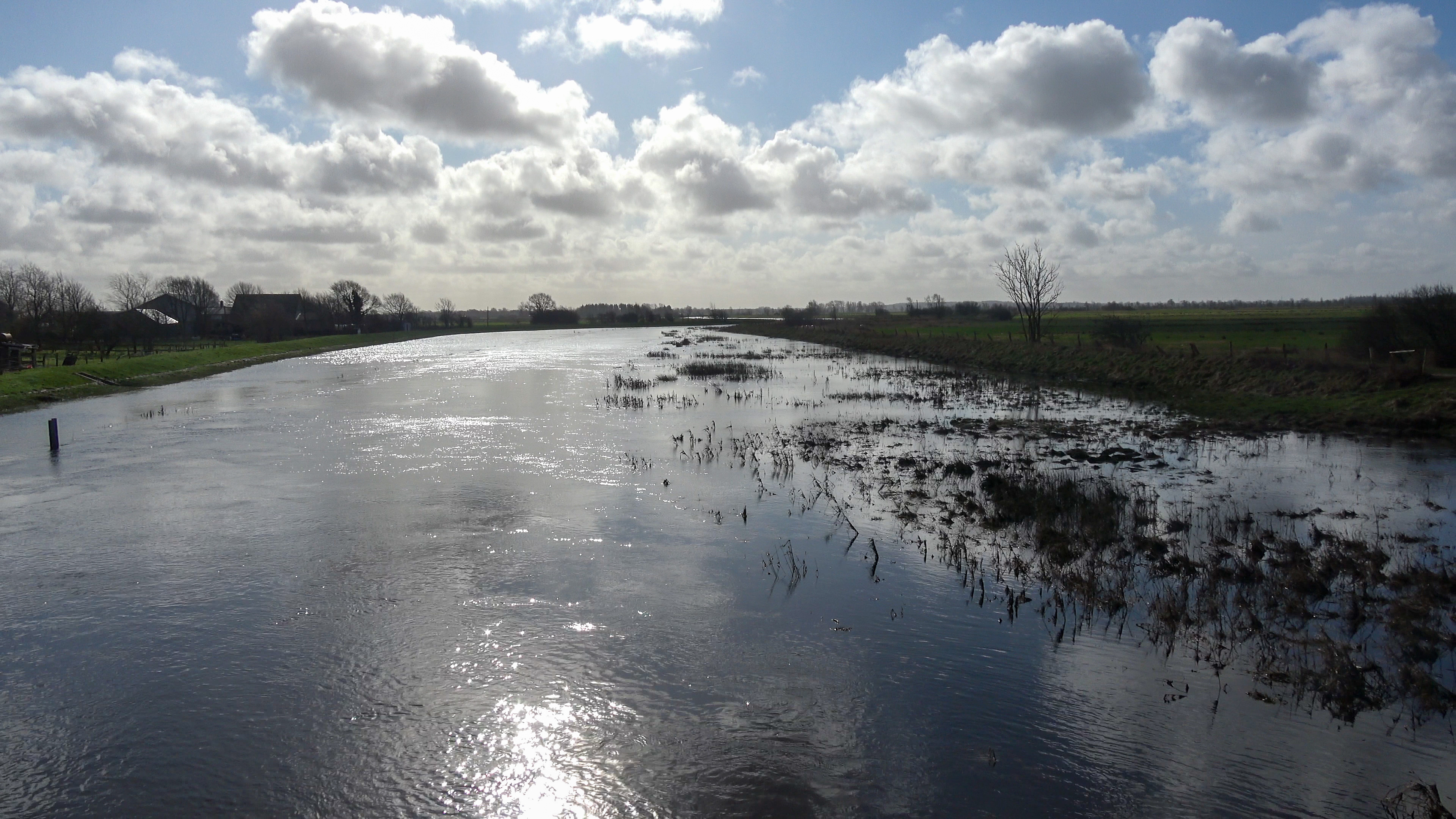 Blick von der Treenebrücke nach Süden zur Mündung